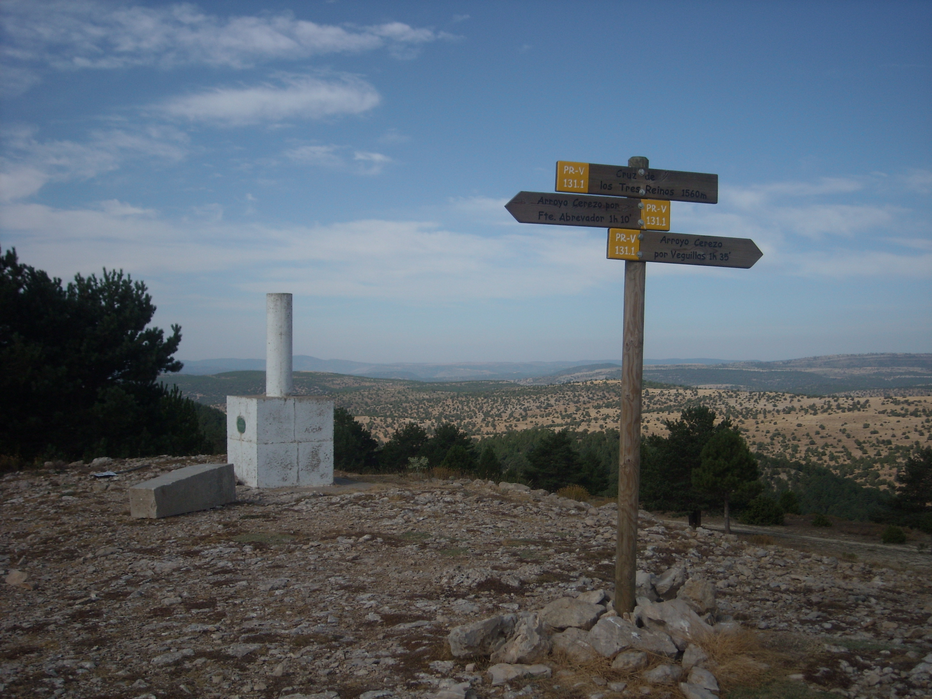 El cim de la muntanya